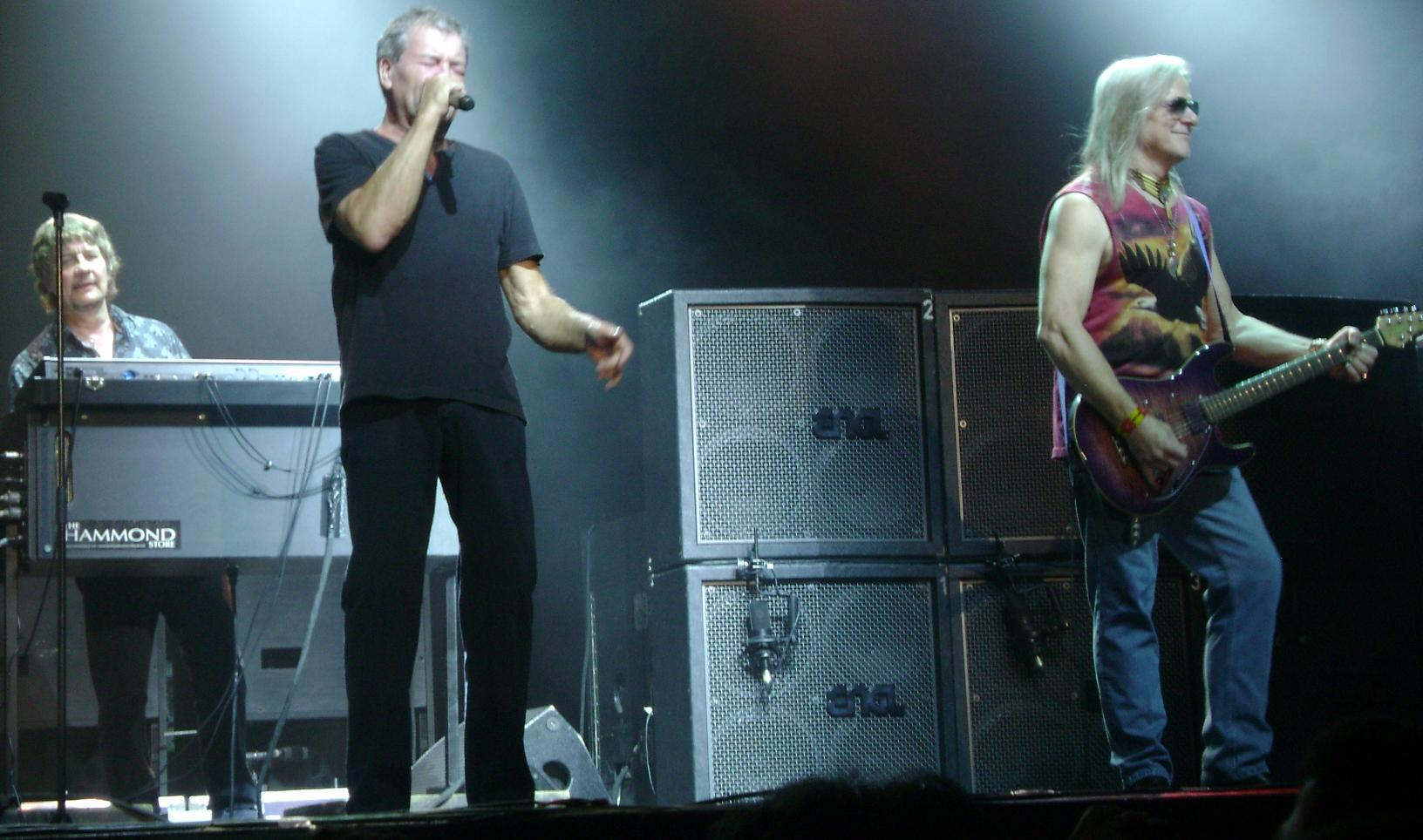 Airey, Gillian e Morse em BH, 11 Outubro 2011.